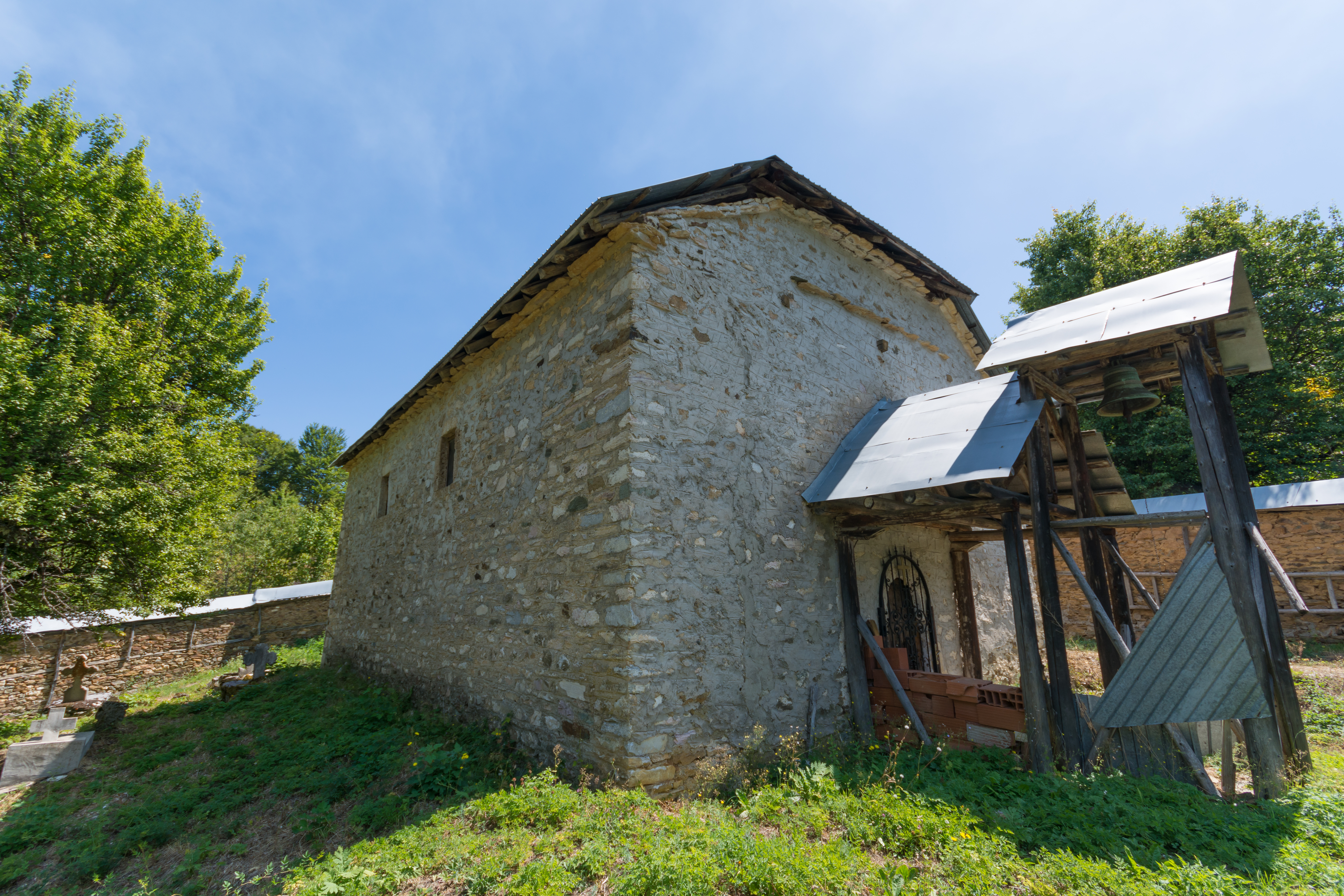 Црква „Св. Никола“ во село Кичиница, општина Маврово-Ростуша